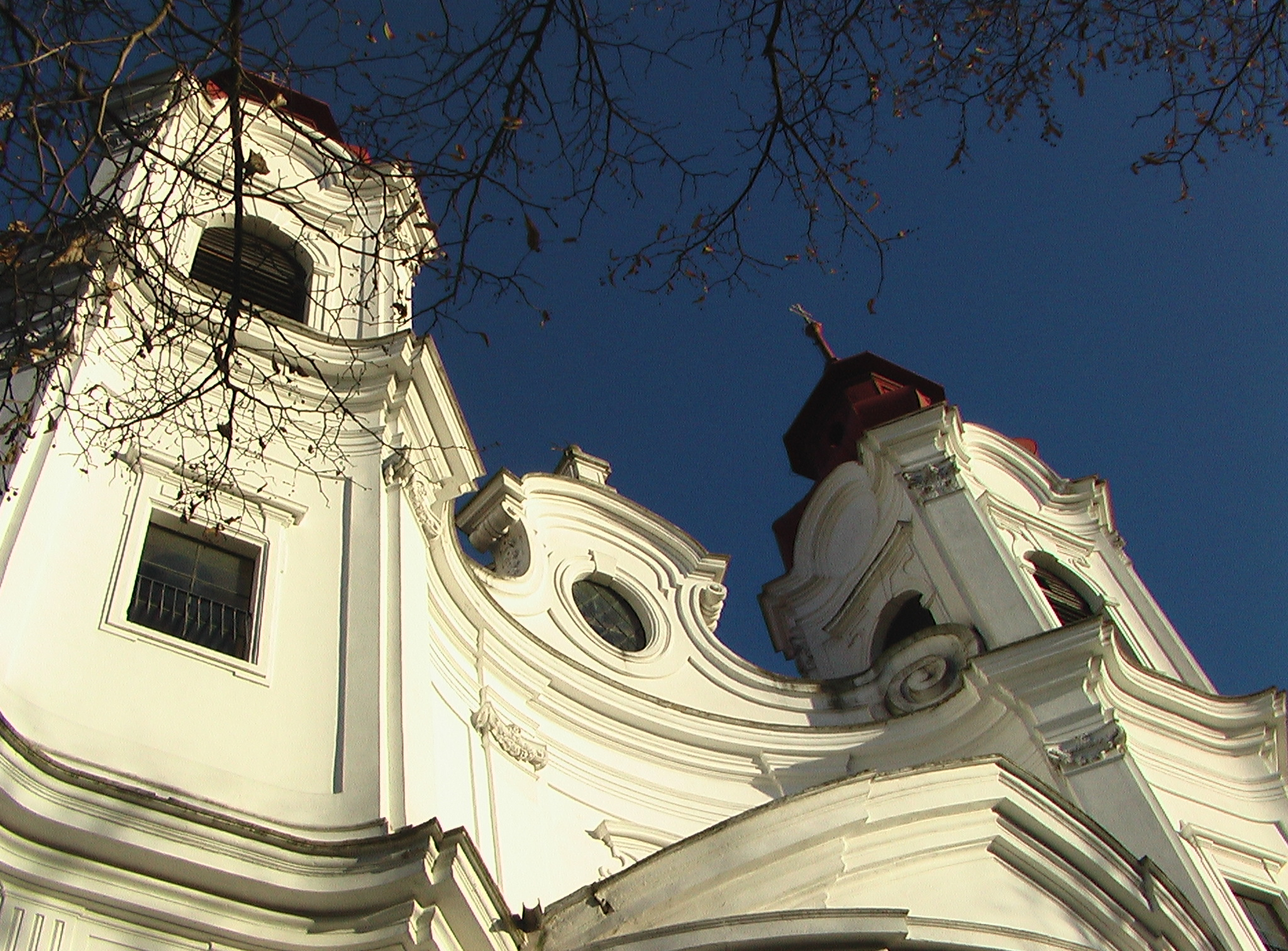 Lechwitzer Kirche Westfront